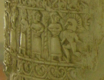 Museo archeologico di Firenze, pisside da Chiusi, terzo quarto del VII sec. a.c. 03 dettaglio